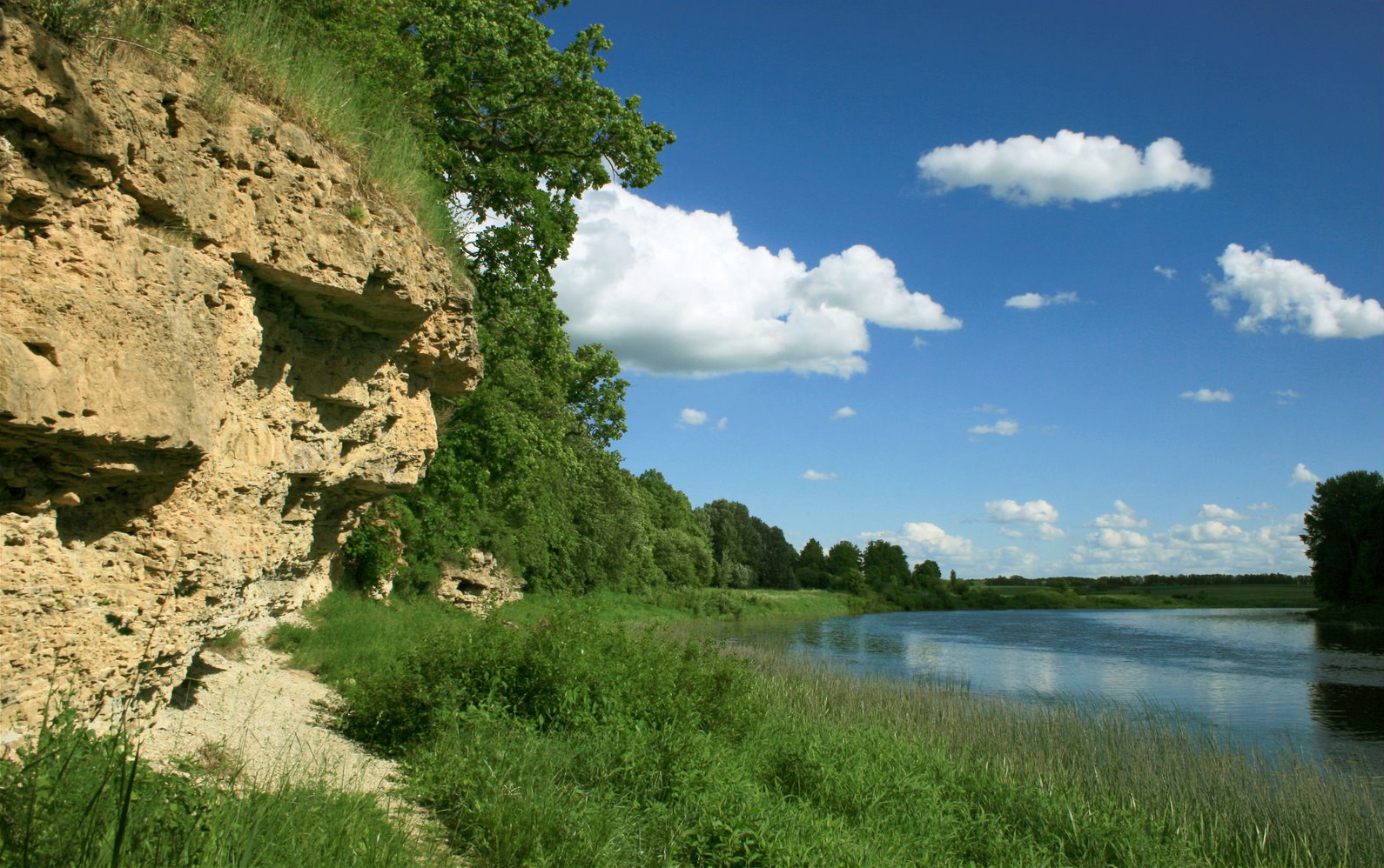 Lielupe